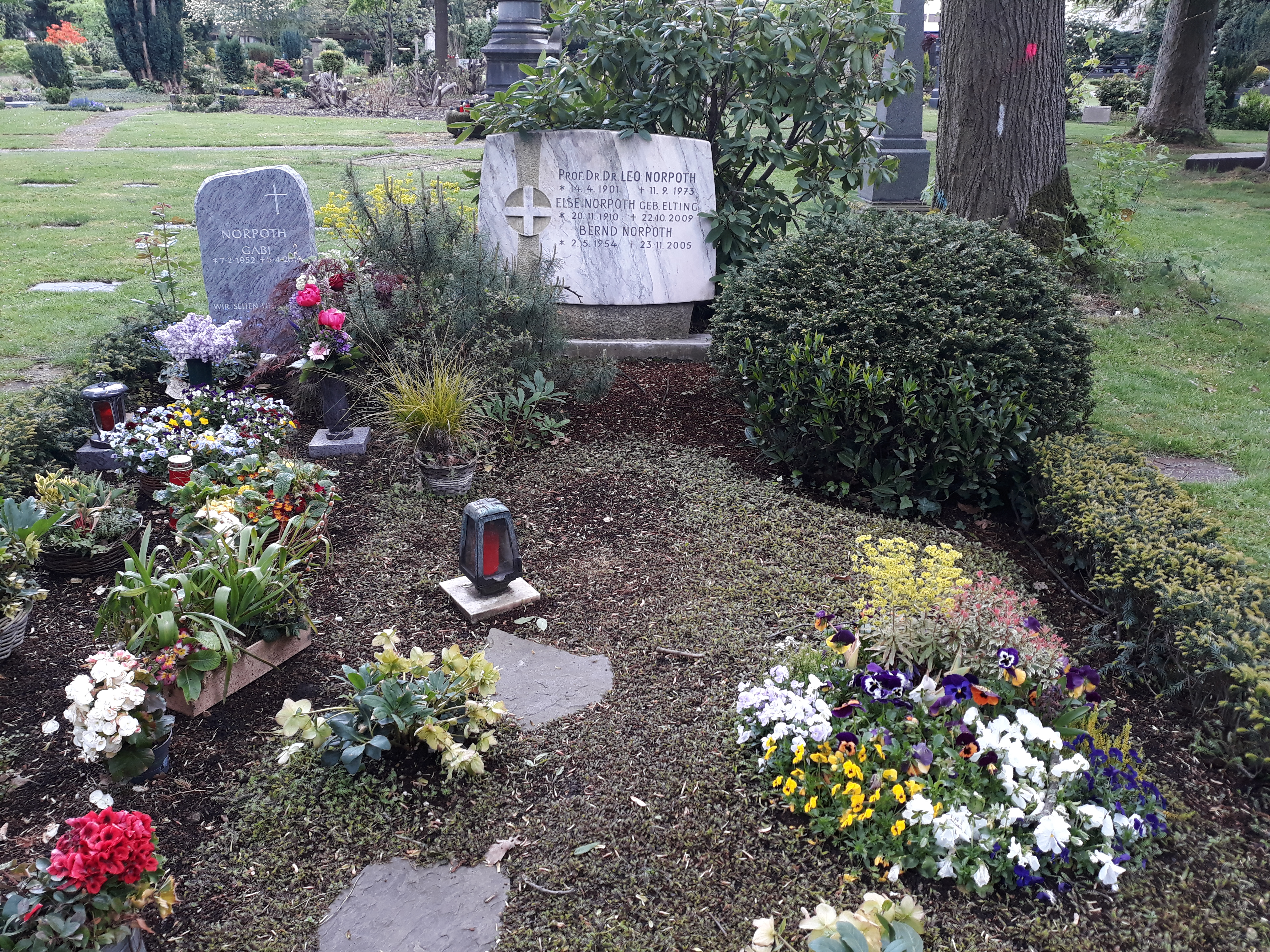 Das Grab des deutschen Mediziners und Medizinhistorikers Leo Norpoth, seiner Ehefrau Else und Sohn Bernd im Familiengrab auf dem Ostfriedhof Essen.